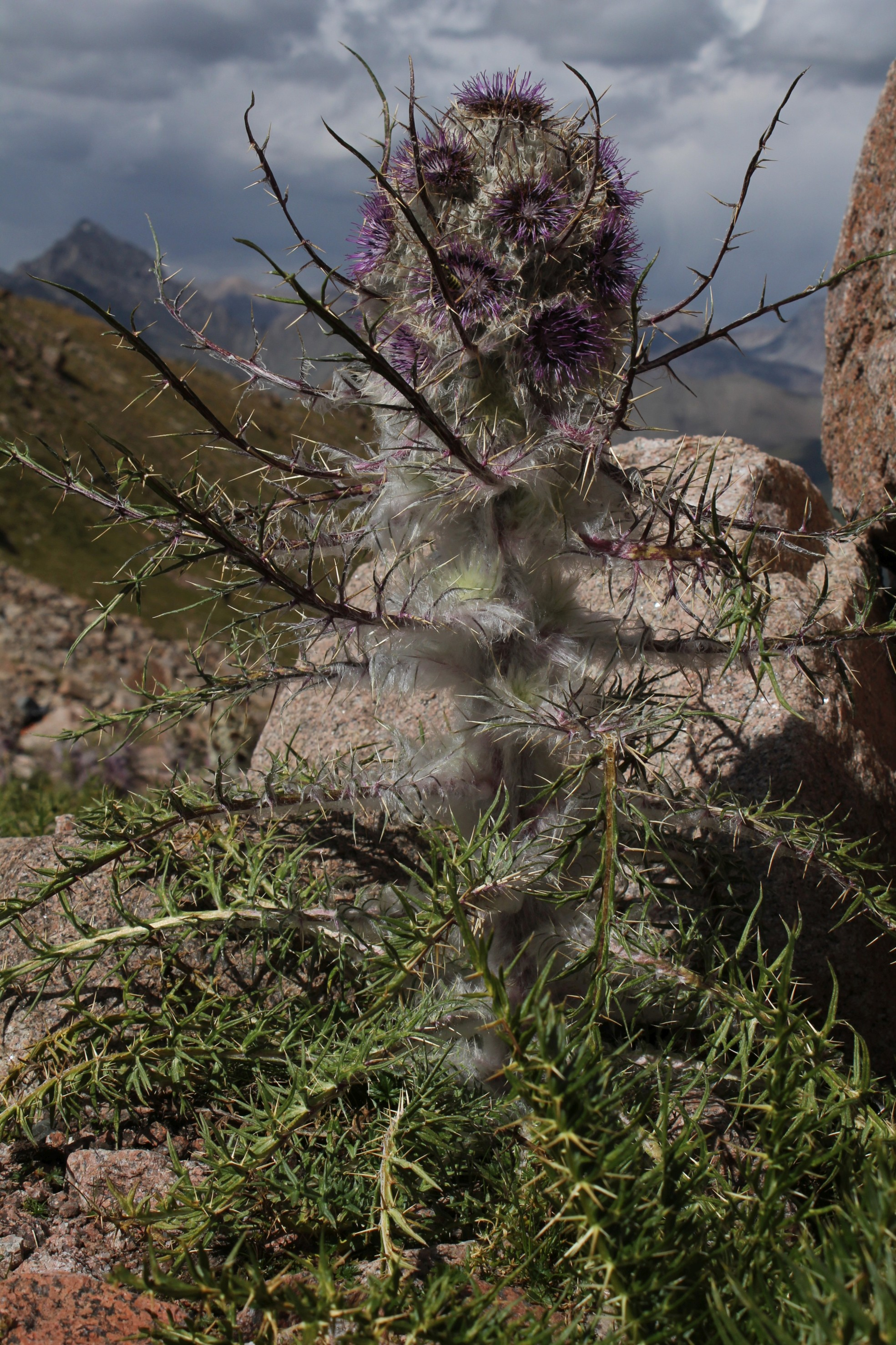 Schmalhausenia nidulans, Kungey Alatoo, Tianshan, Kirguistán en 3400m, 20120816